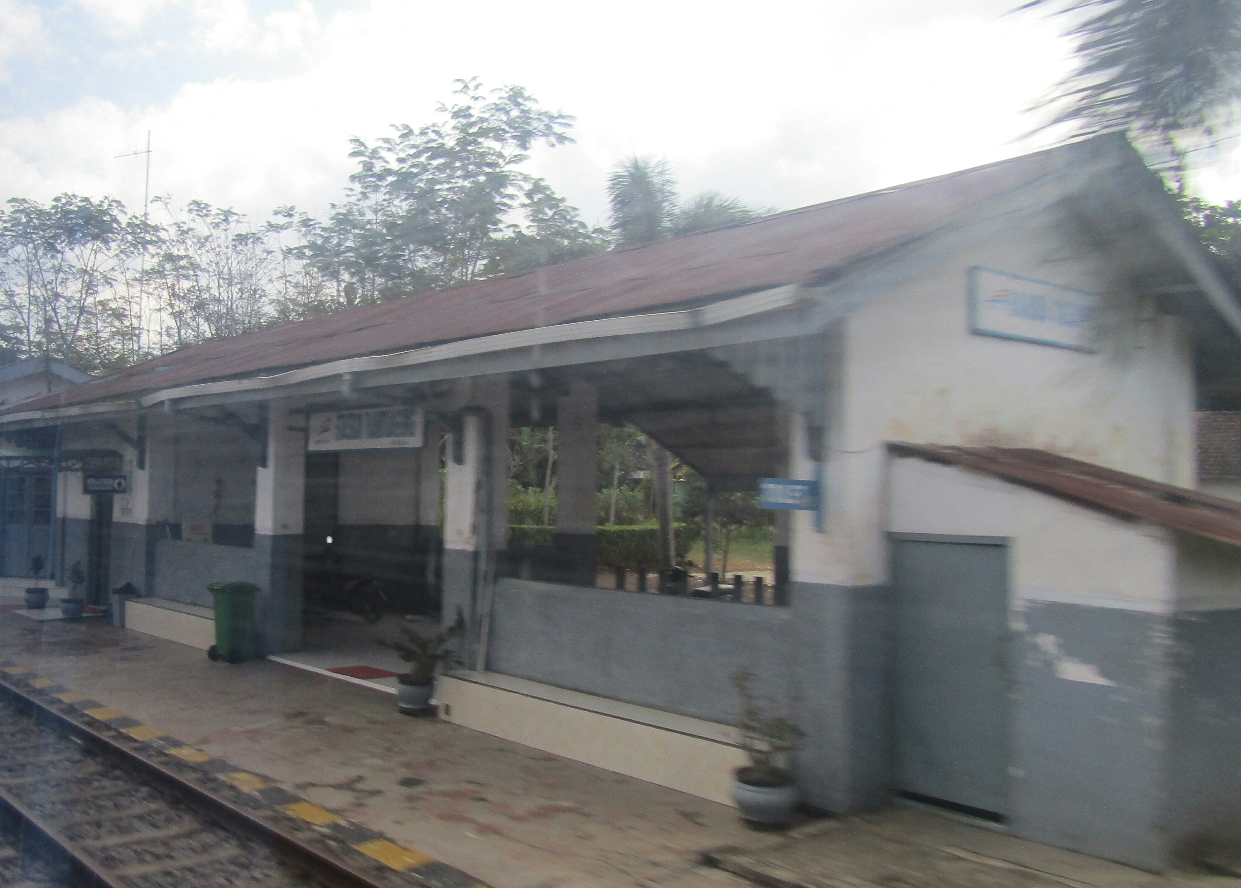 Stasiun Randuagung, 2019